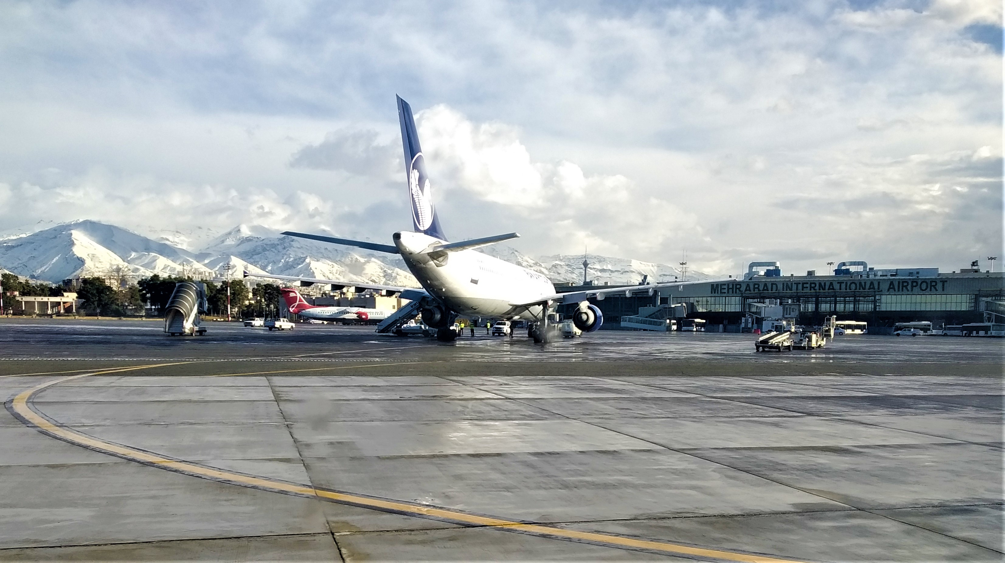 فرودگاه مهرآباد